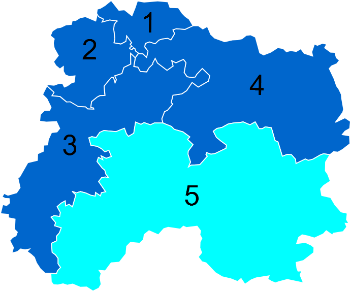 Résultats des élections législatives de la Marne en 2012